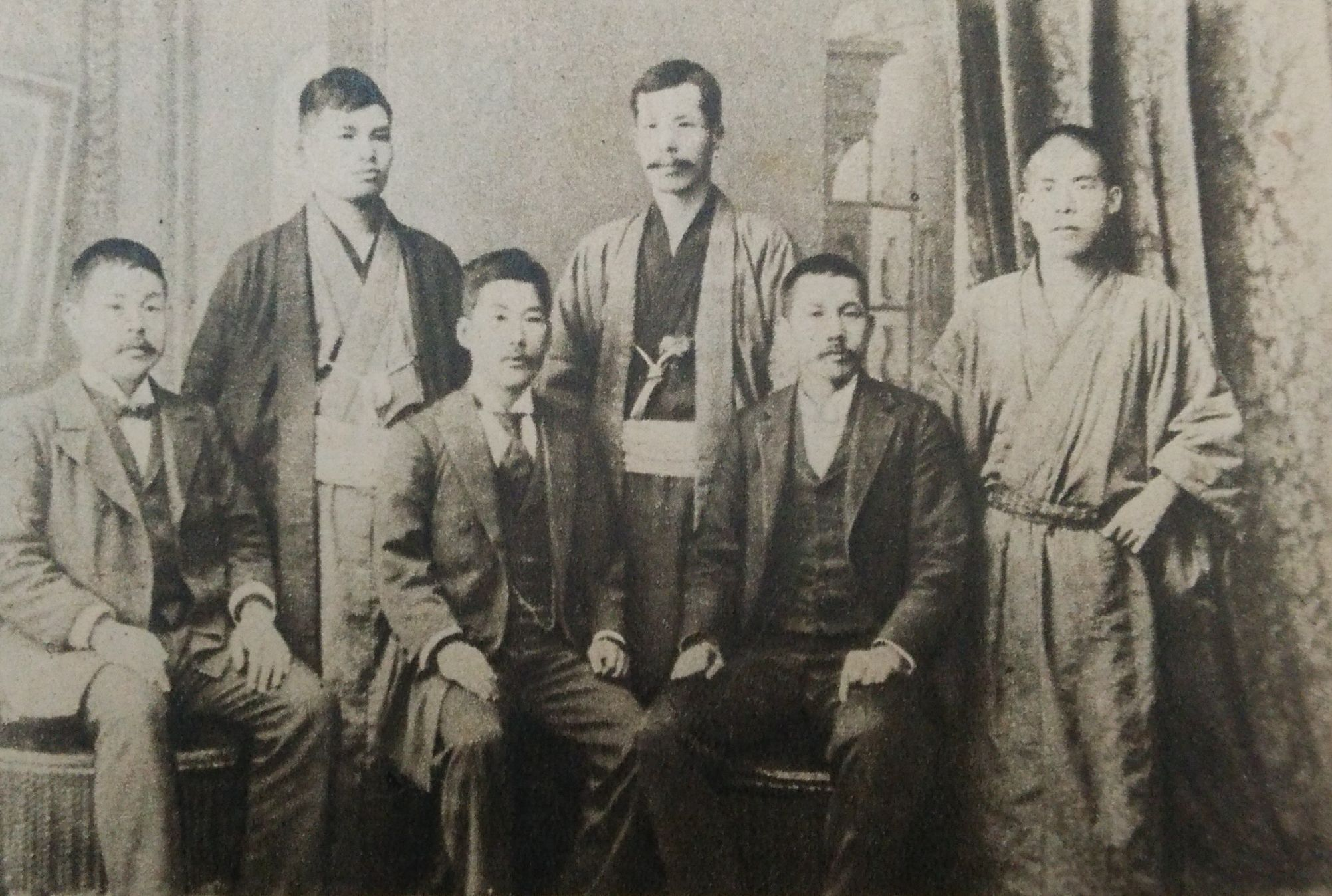 左から、安部磯雄、一人おいて幸徳秋水、木下尚江、片山潜